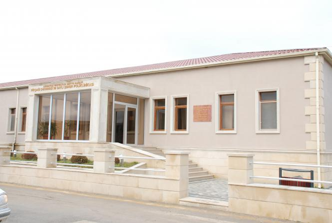 Zabrat poliklinika